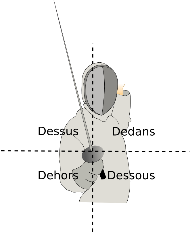 Les lignes au fleuret